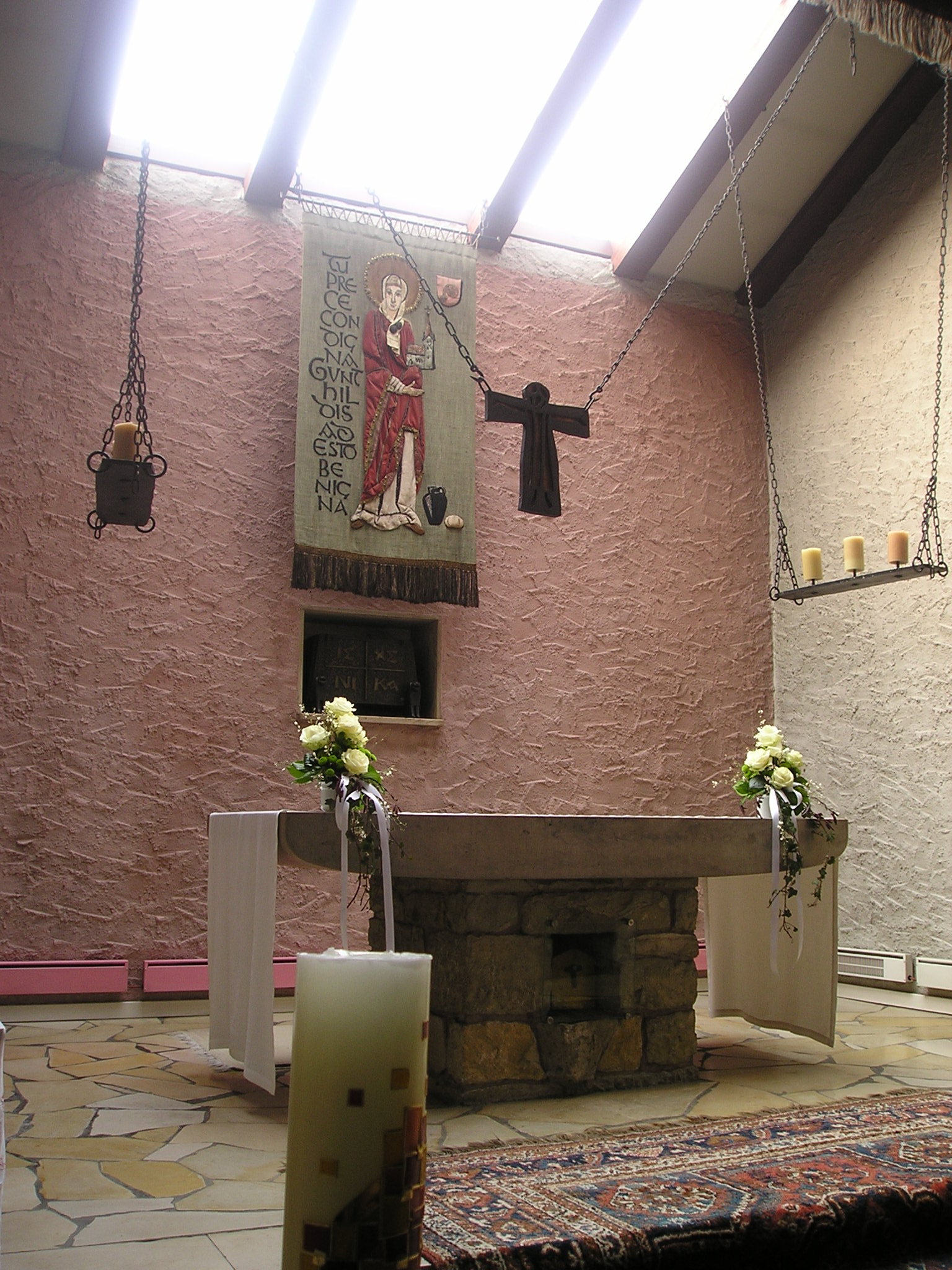 Dettenheim bei Weißenburg in Bayern, Scheunenkirche, Altarraum